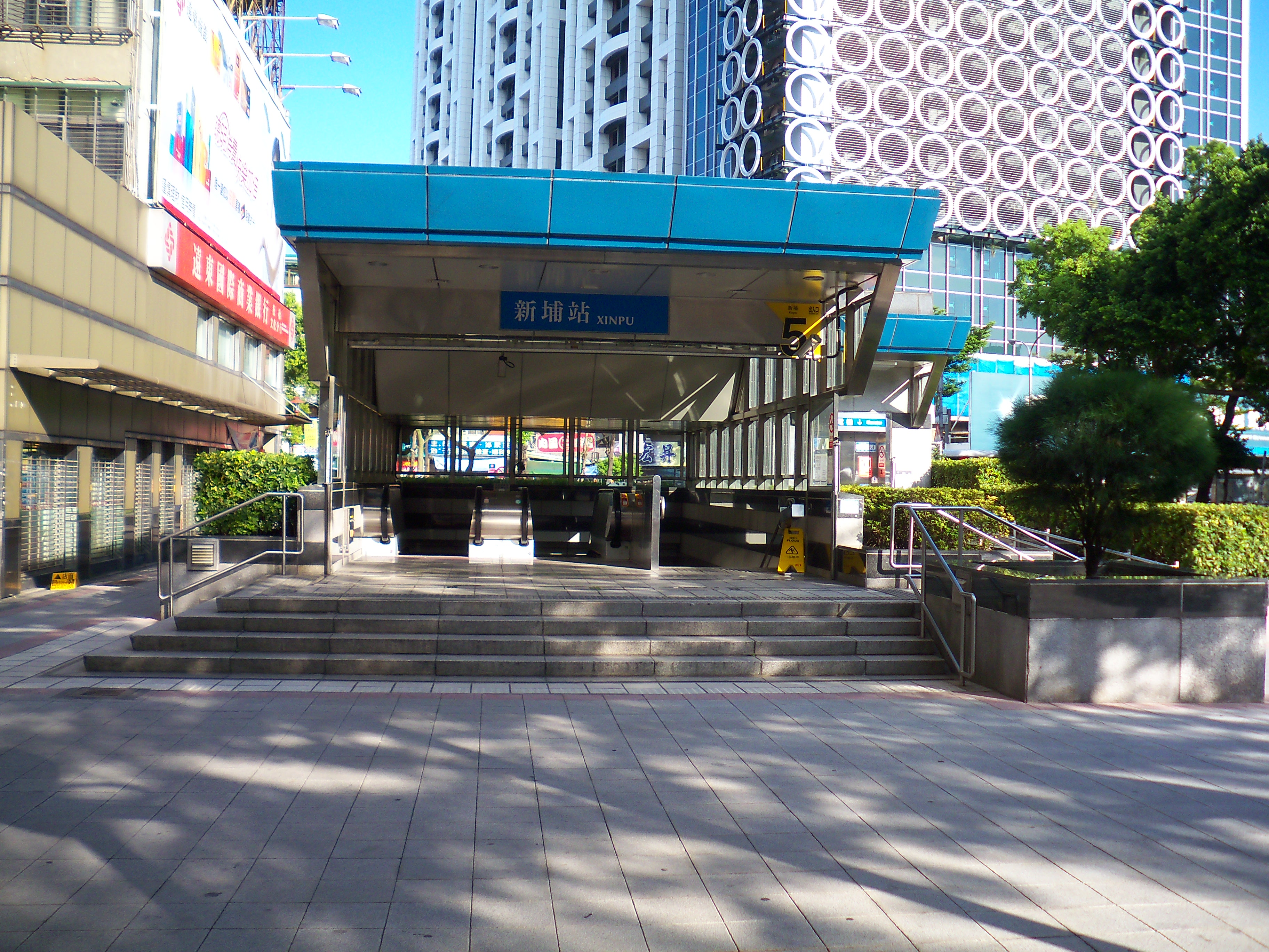 台北捷運板橋線新埔駅5号出口。中文（台灣）: 台北捷運板橋線新埔站5號出口。